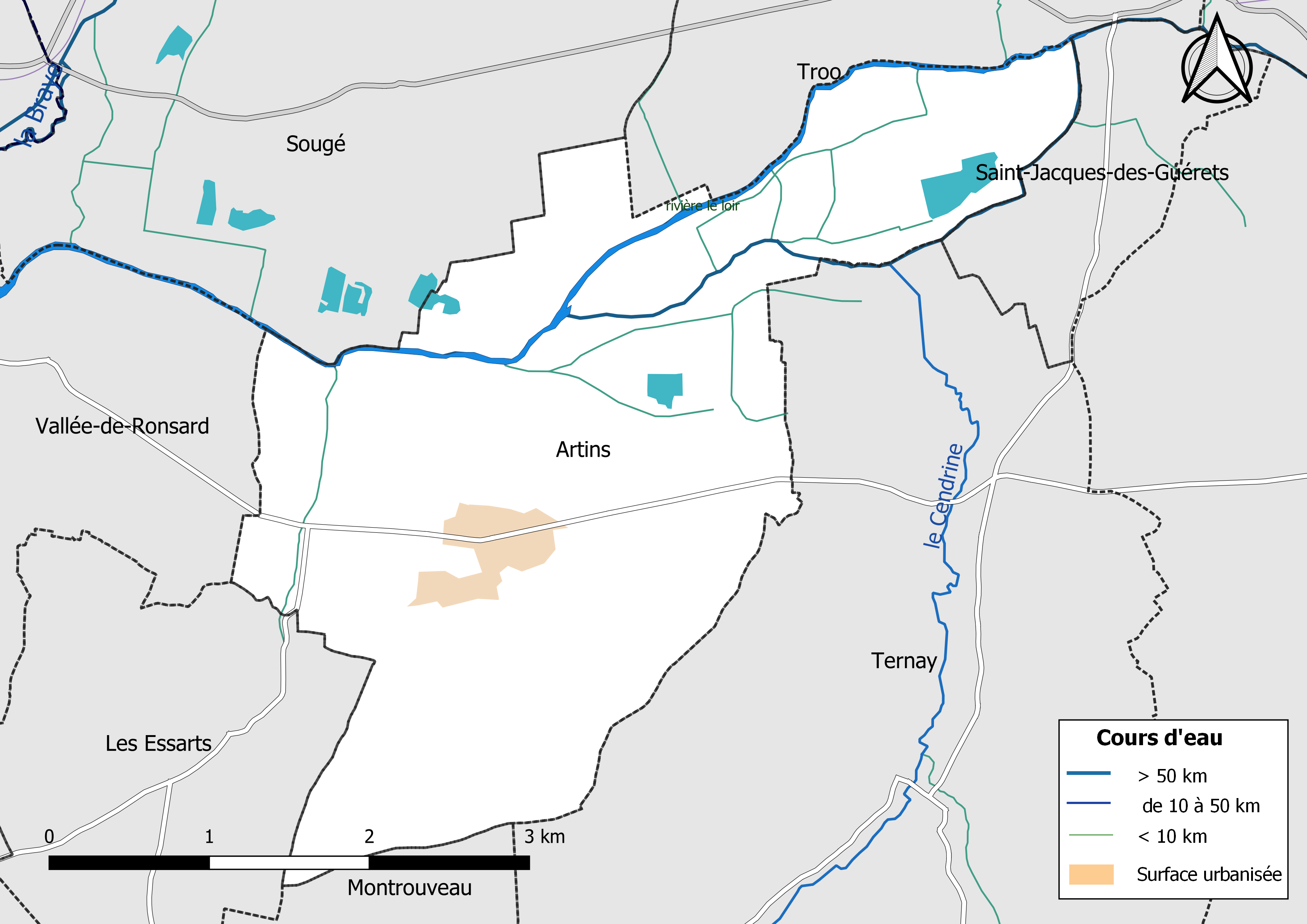 Carte du réseau hydrographique de la commune d'Artins (Loir-et-Cher, France).